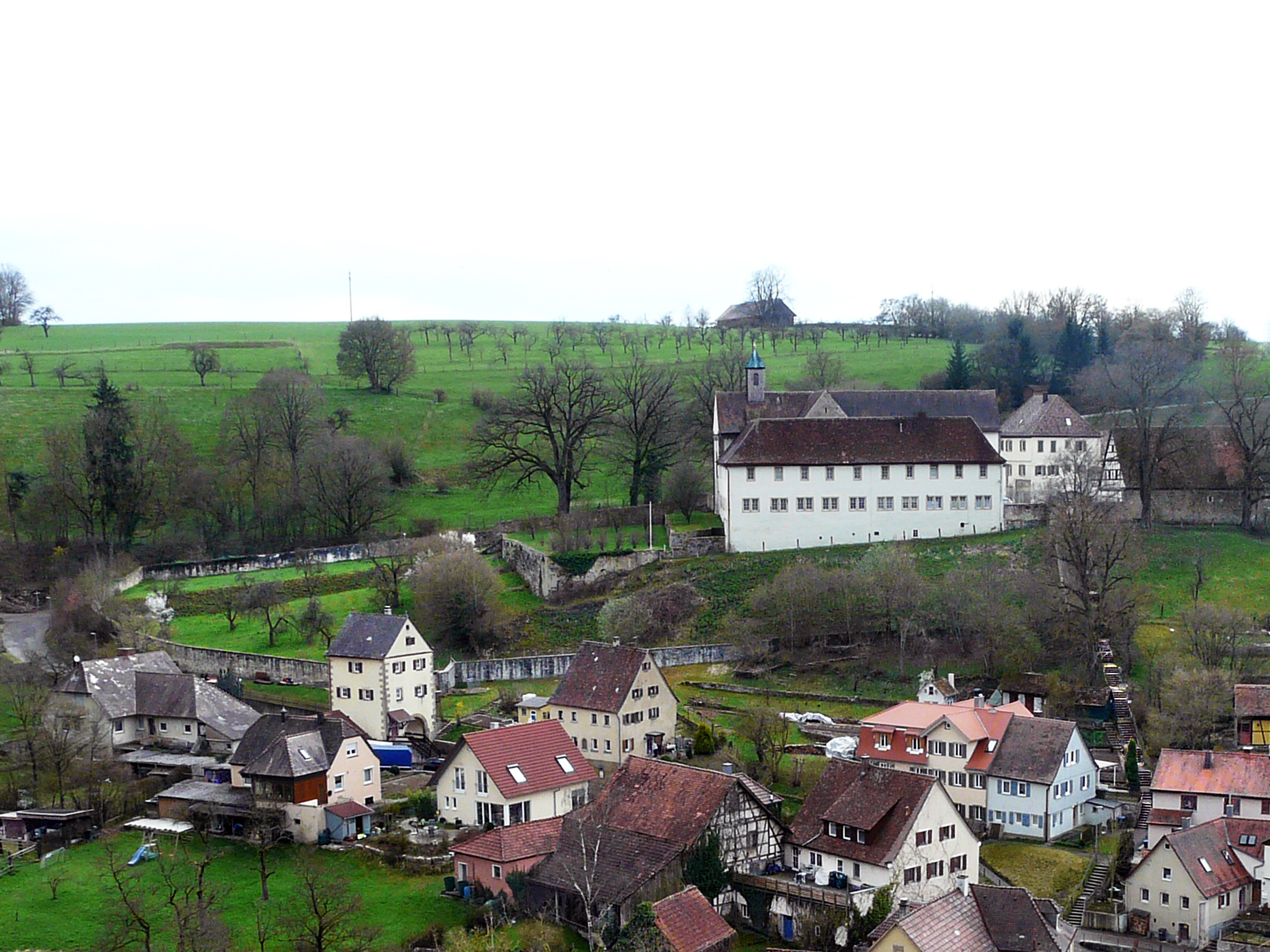 Малый Комбург